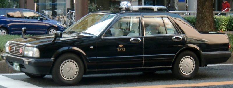 名古屋ハイタク協同組合に加盟する太陽交通のタクシー